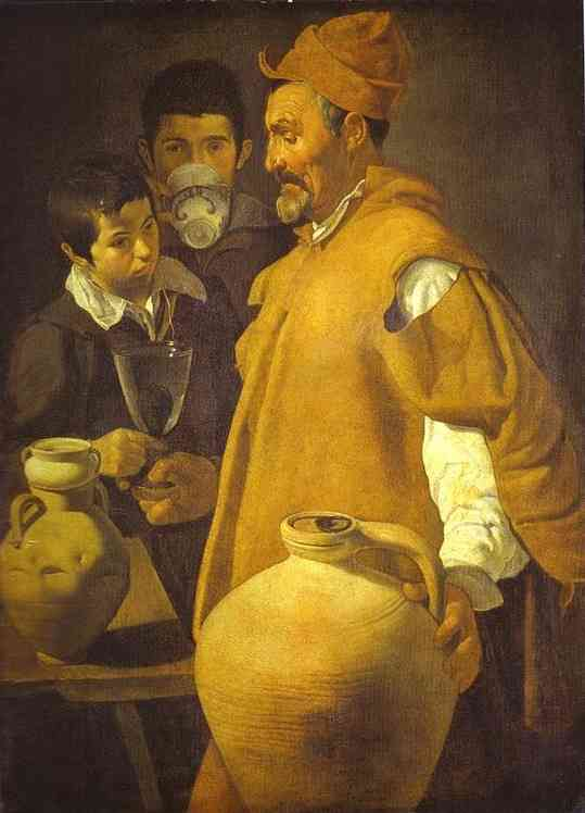 Velázquez: El aguador de Sevilla. Copia en el Museo Ufizzi de Florencia.